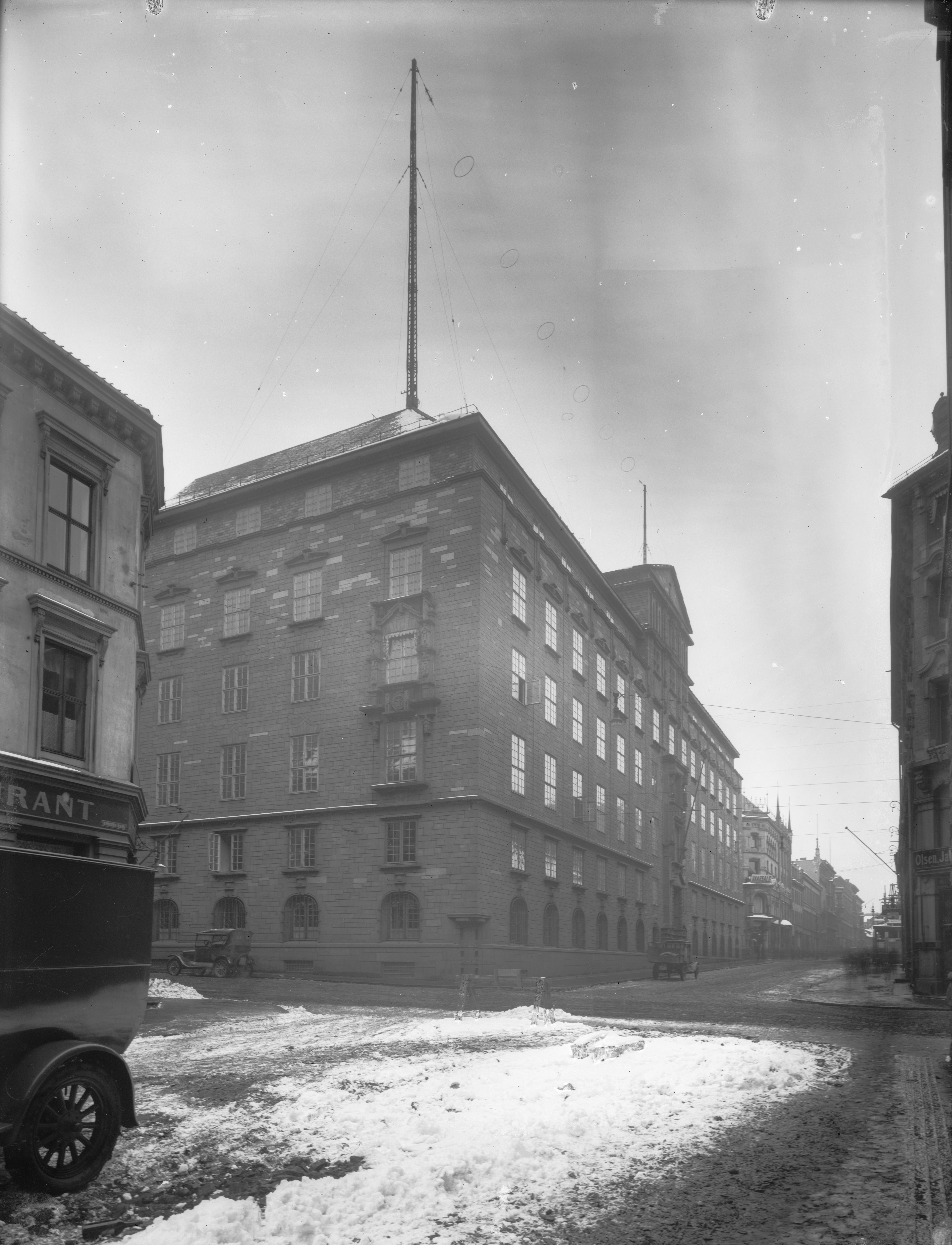 Bildet er hentet fra Nasjonalbibliotekets bildesamling. Anmerkninger til bildet var: Påskrift arkivark: Kringkastingstasjon Eldste arkivnummer: 805 Oslo, Oslo, Oslo